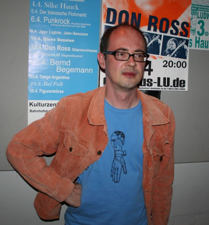 Martin Büsser nach einer Lesung aus "Punk Rock - Die ganze Geschichte" (John Robb) im Ludwigshafener Café Dome